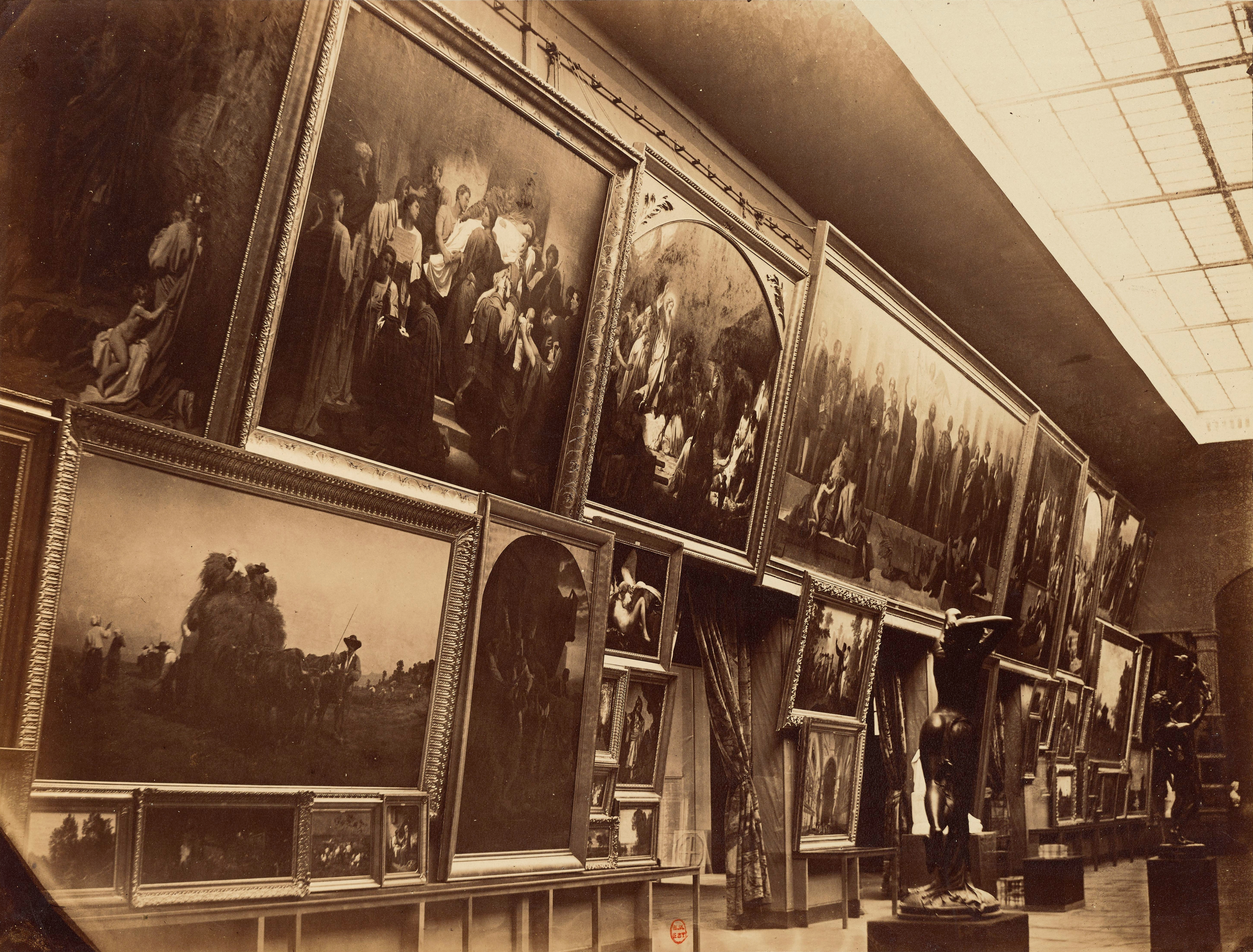 Album Exposition Universelle des Beaux-Arts, avenue Montaigne, Paris 1855. Galerie française, photographie par André Adolphe Eugène Disdéri, 37 x 53 cm. Bibliothèque nationale de France, RESERVE FOL-VE-611.